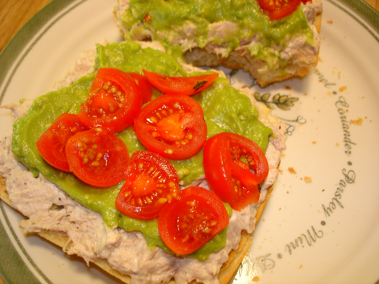 tuna, guacamole sauce and cherry tomatoes